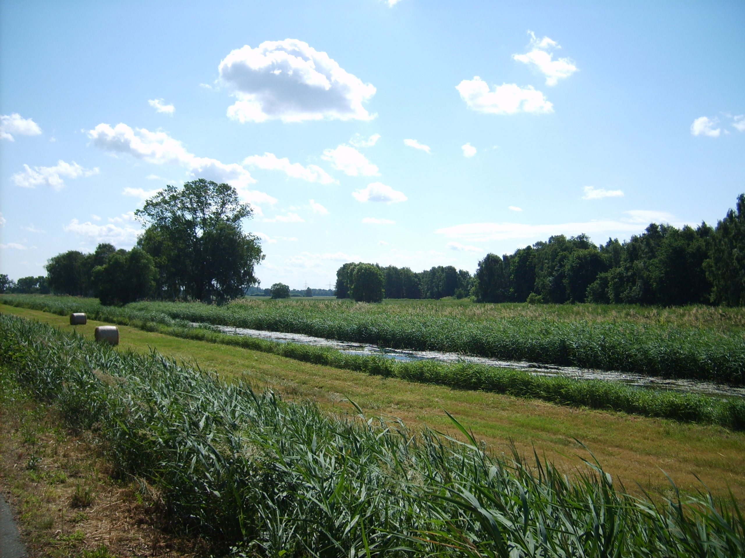 Der Schraden bei Plessa